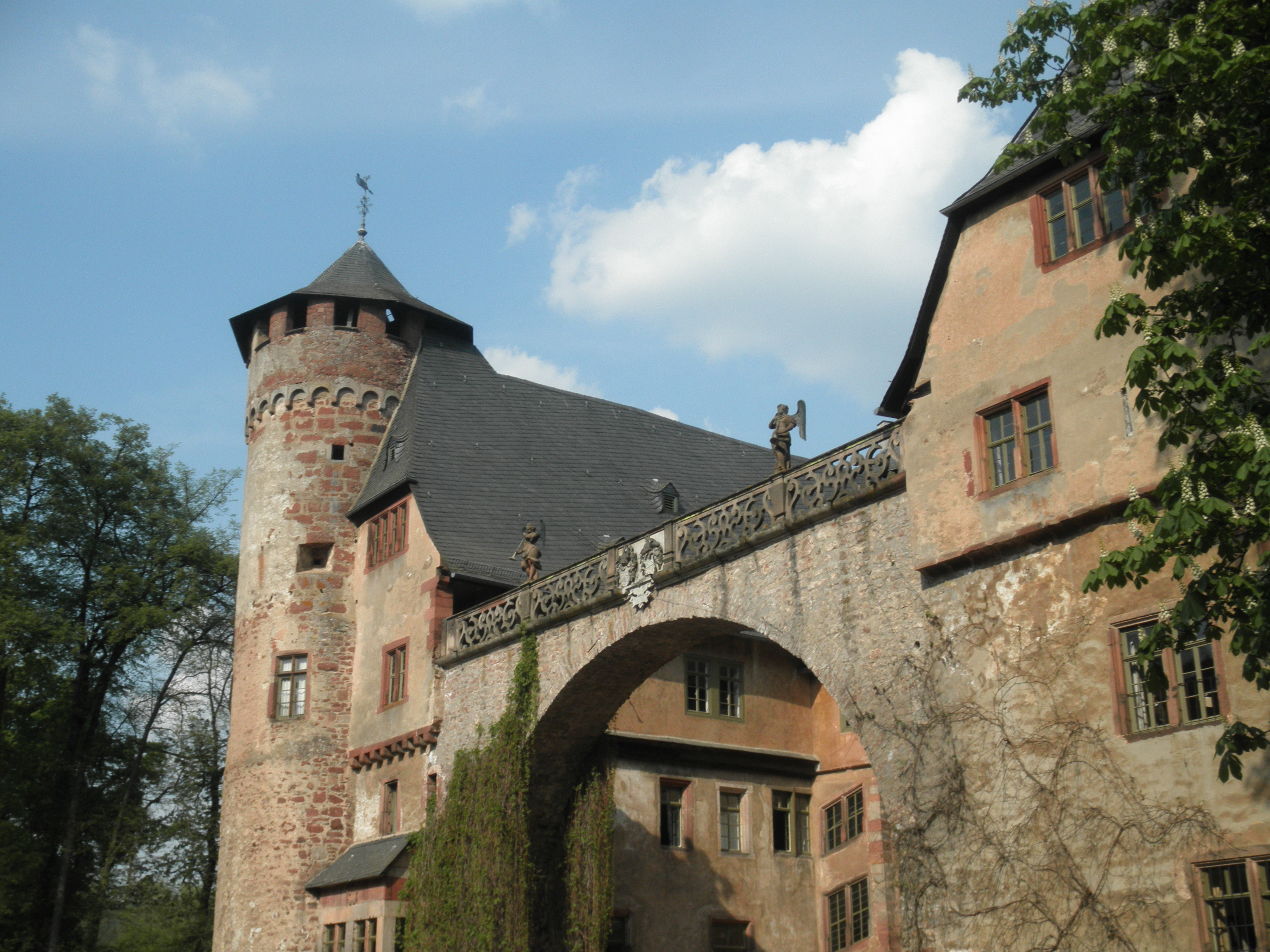 kastelo Fürstenau en Michelstadt